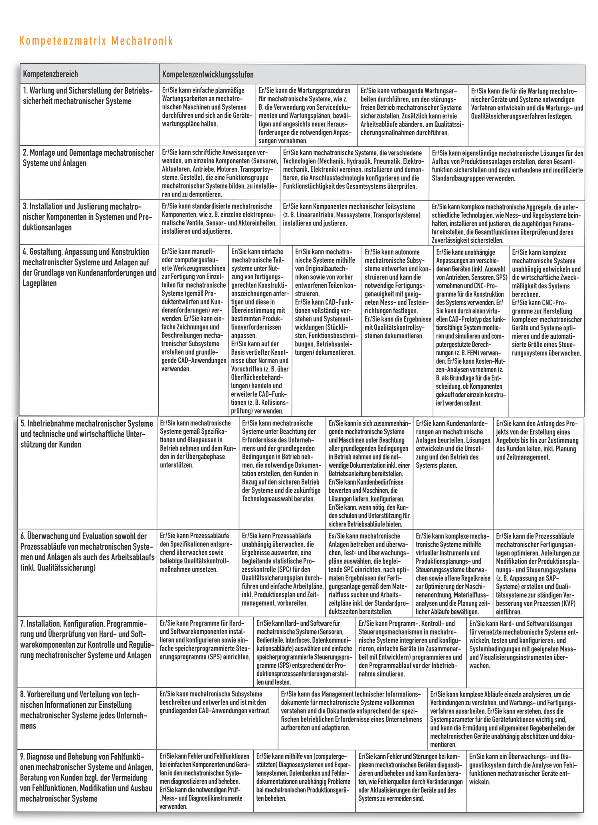 VQTS Matrix Mechatronik